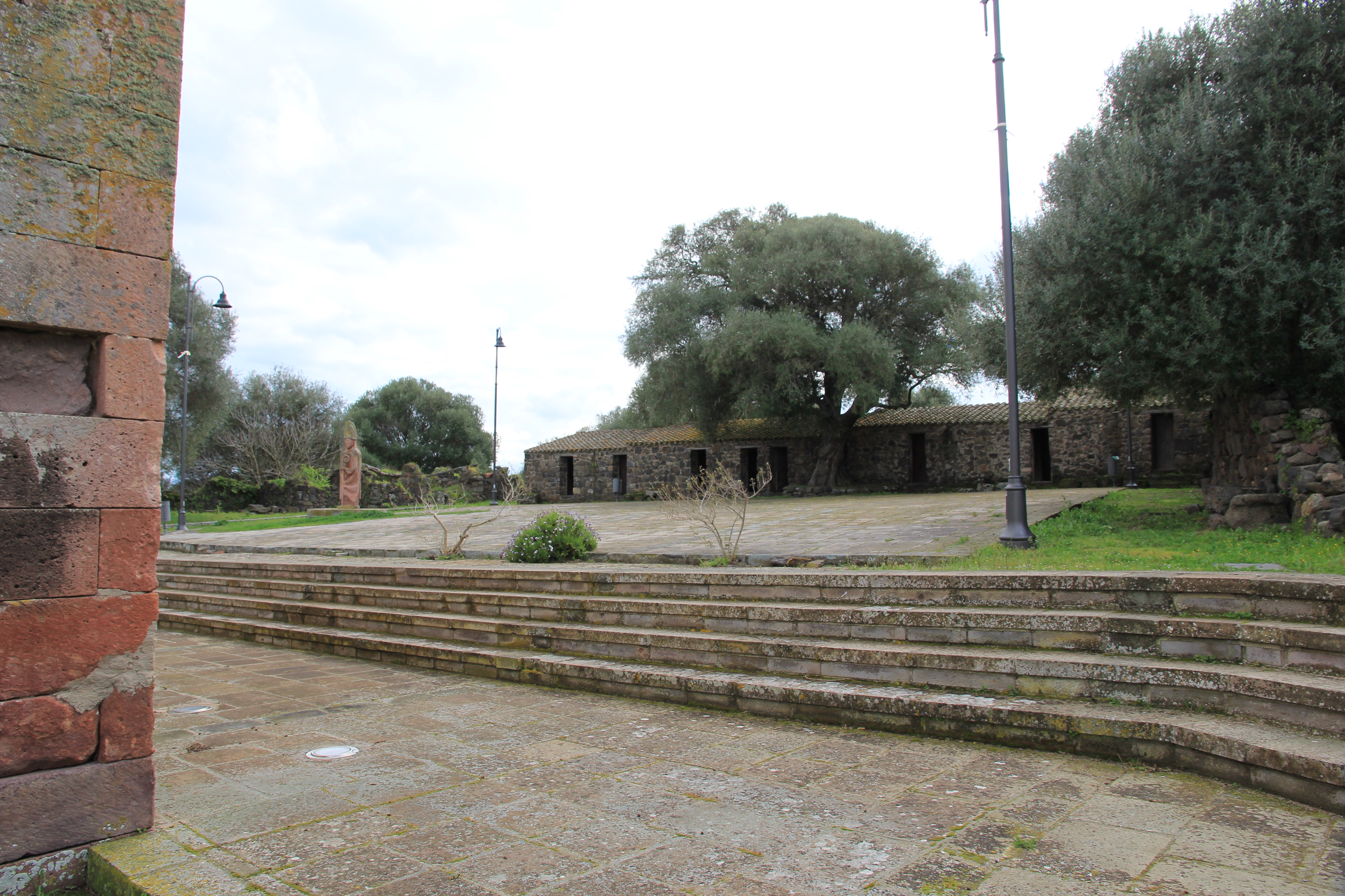 Villanova Truschedu - Chiesa e parco di San Gemiliano